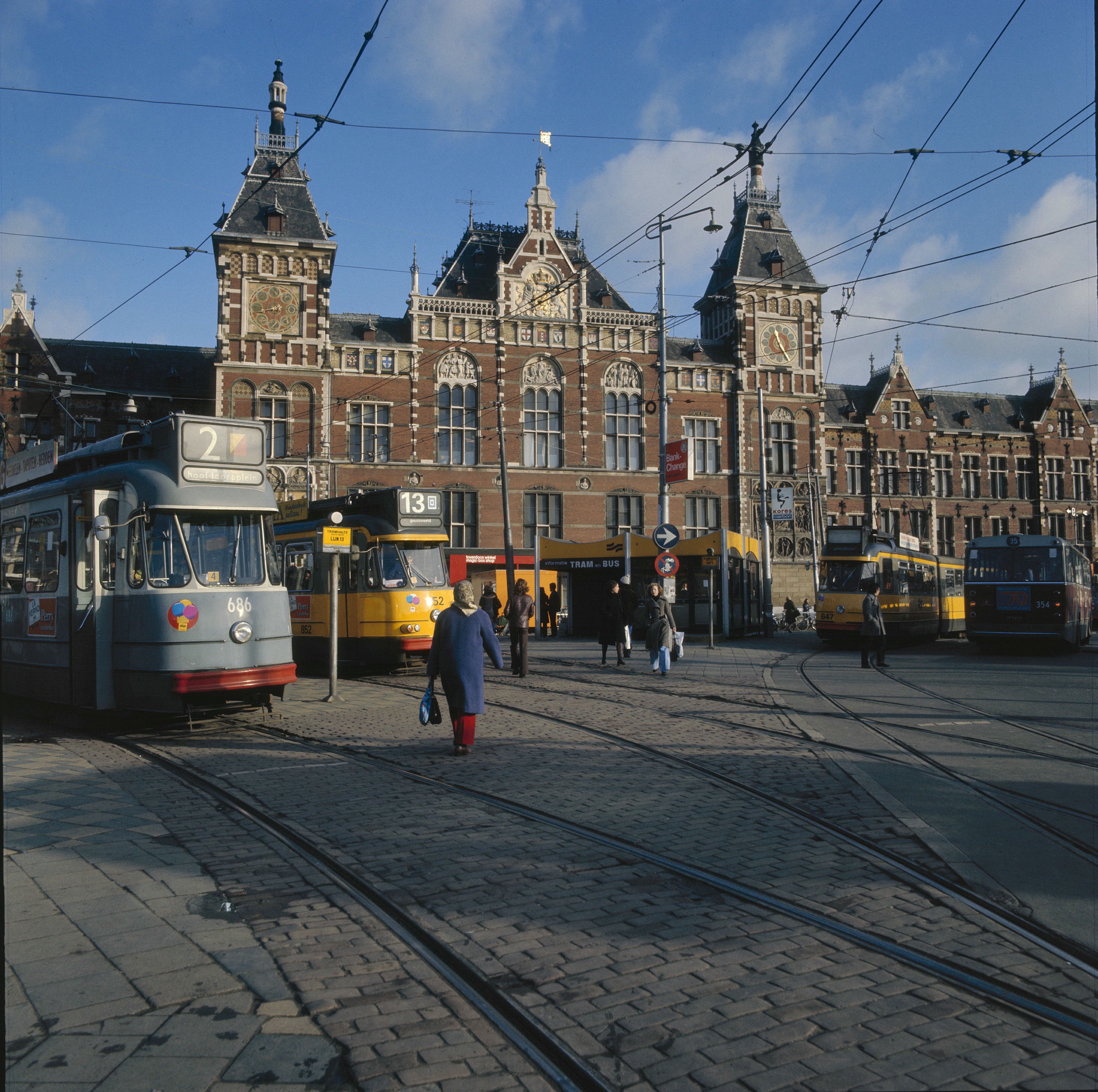 Centraal Station: Overzicht, voorgevel